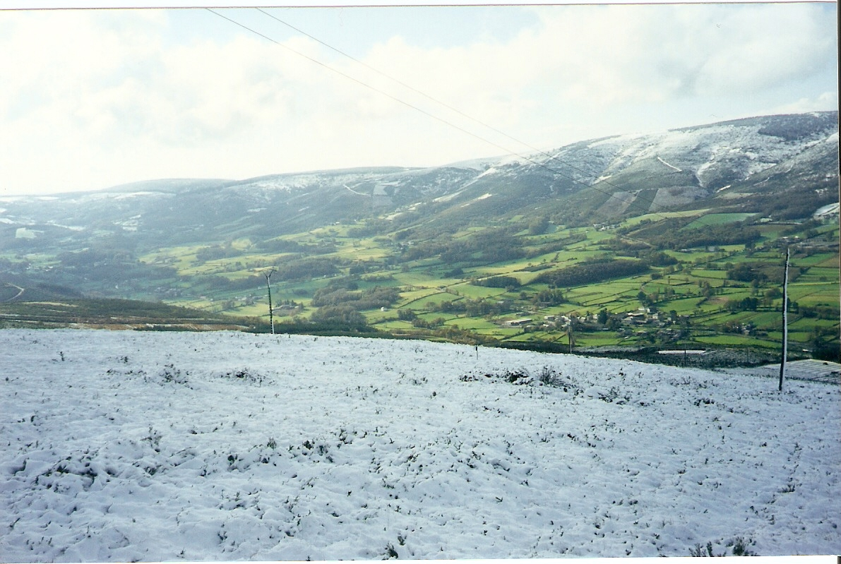 Nevarada do ano 1999